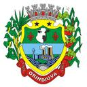 Brasão da cidade de Orindiúva, SP